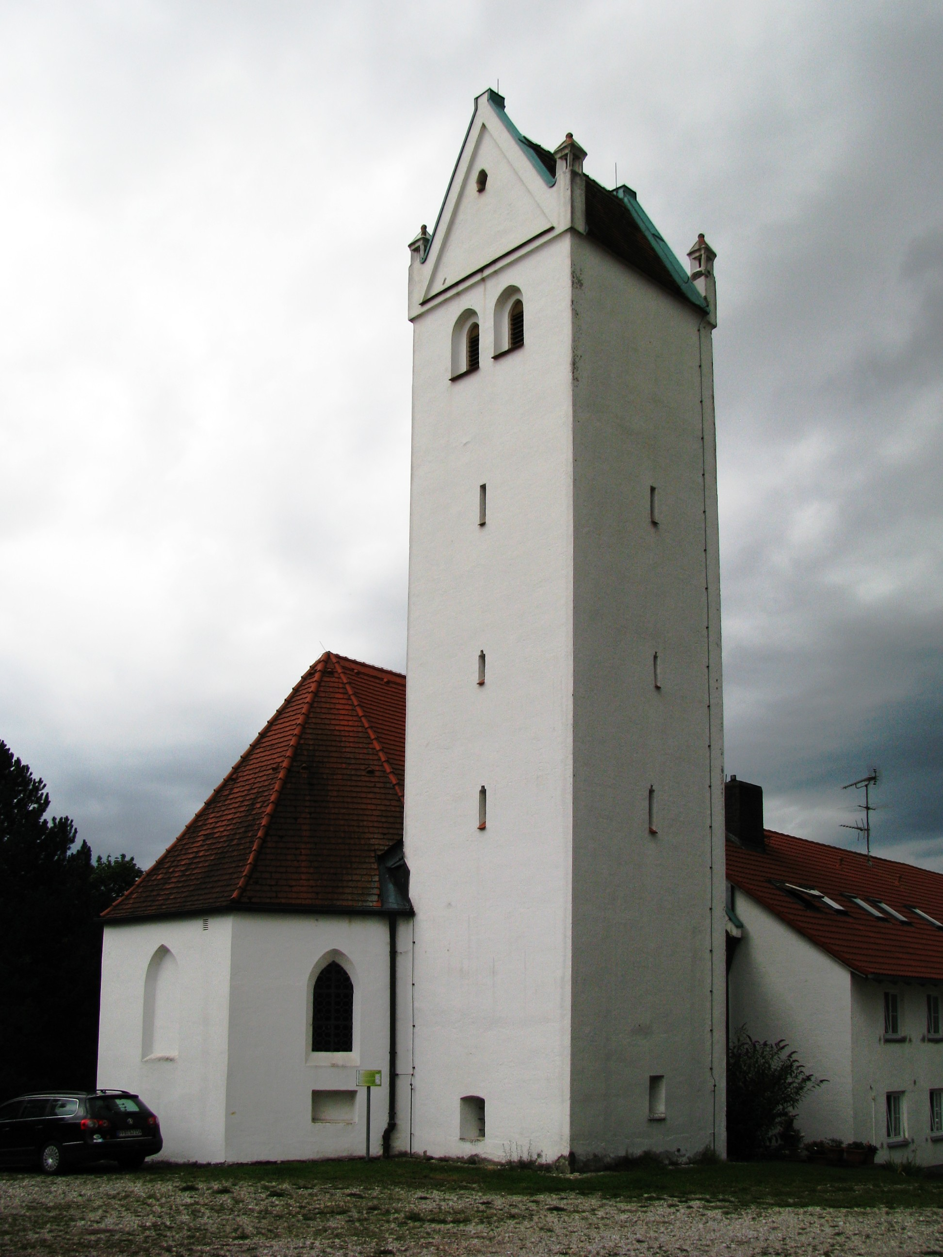 Kath. Votivkapelle St. Maria und Georg in Hoflach.